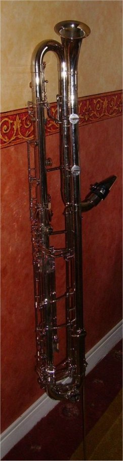 Ma clarinette contrebasse